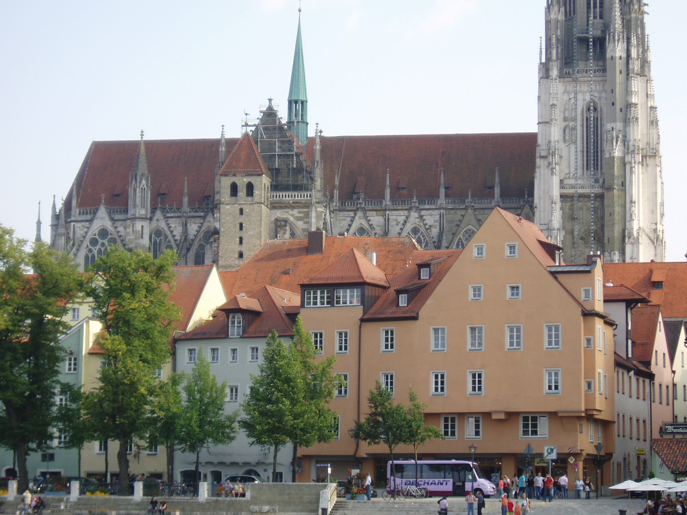 Regensburger Dom